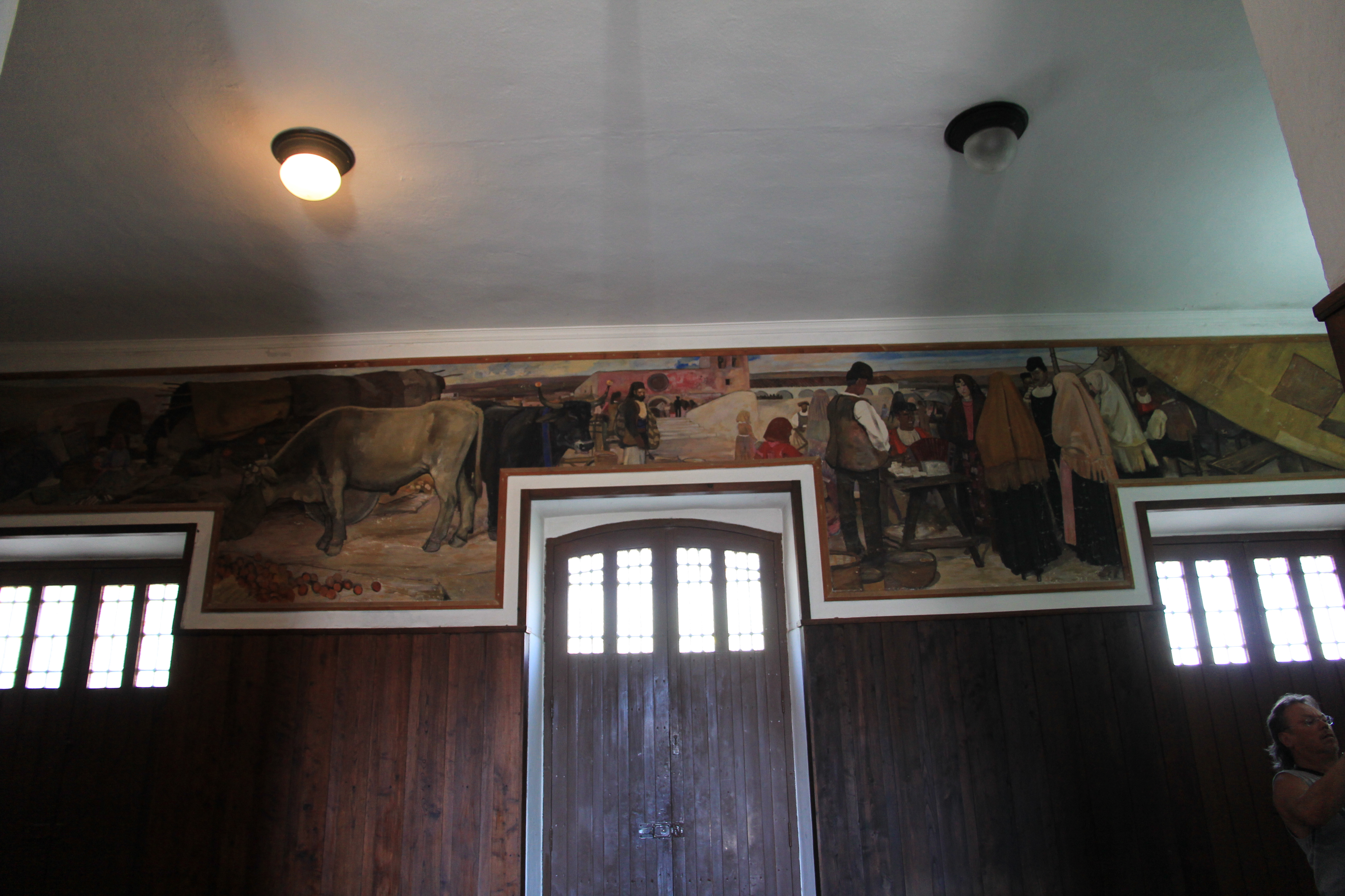 Tempio Pausania - Stazione ferroviaria